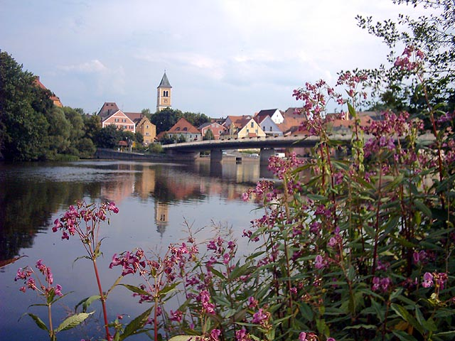 Burglengenfeld (Oberpfalz): Naabblick vor Pithiviers-Brücke